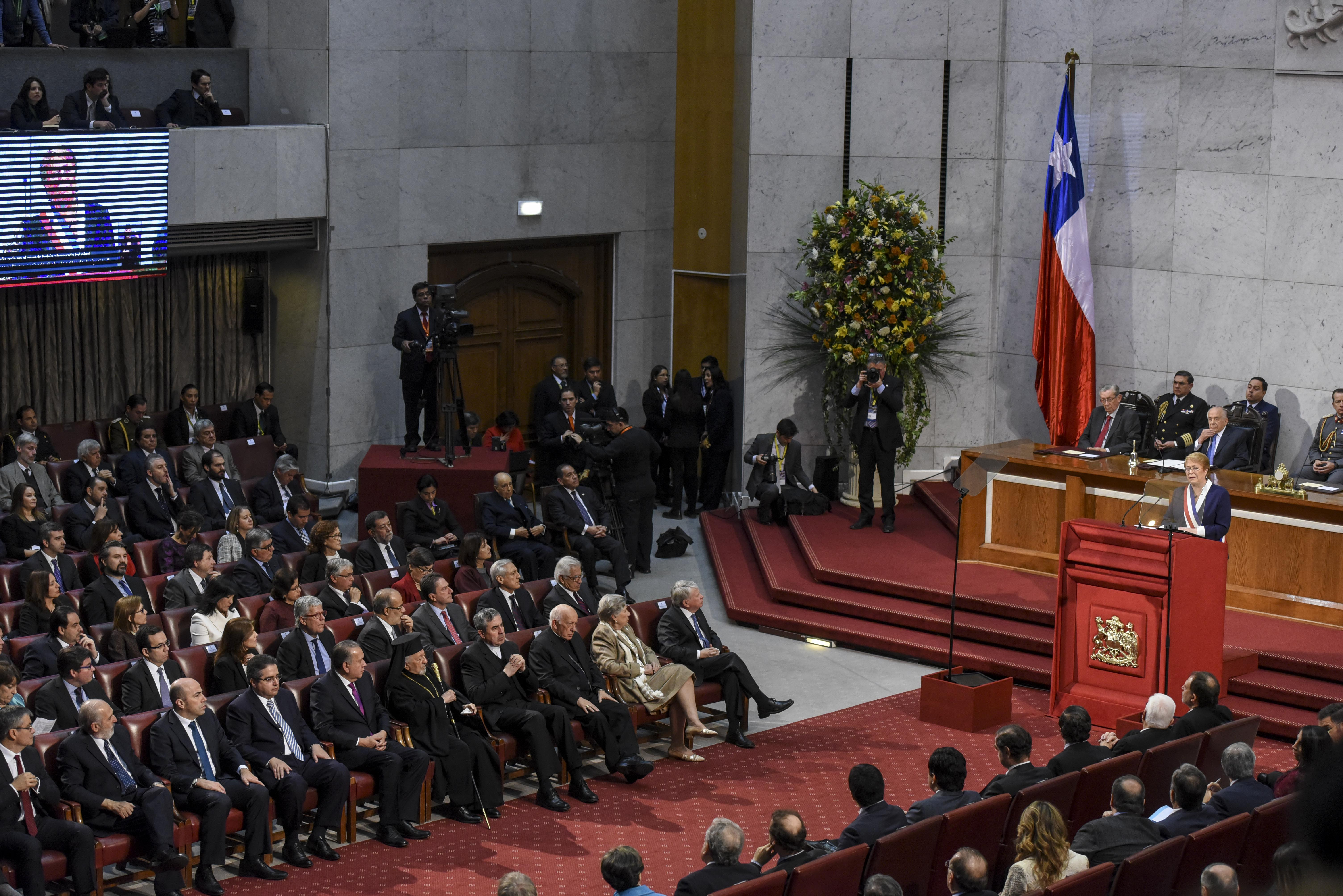 Ministra Paula Narváez asiste a la Cuenta Pública 2017 de la Presidenta Michelle Bachelet